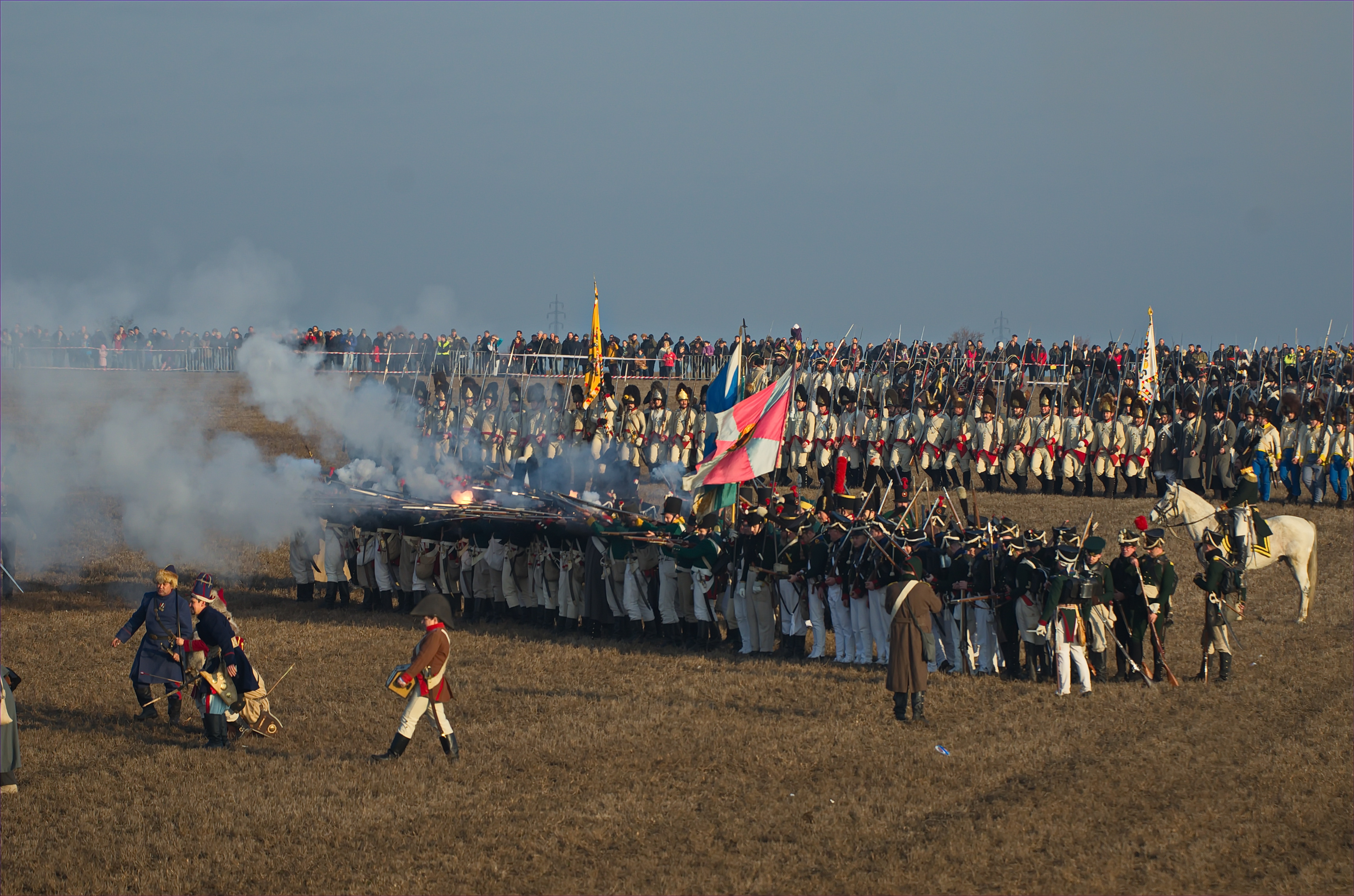 296 - Austerlitz 2015